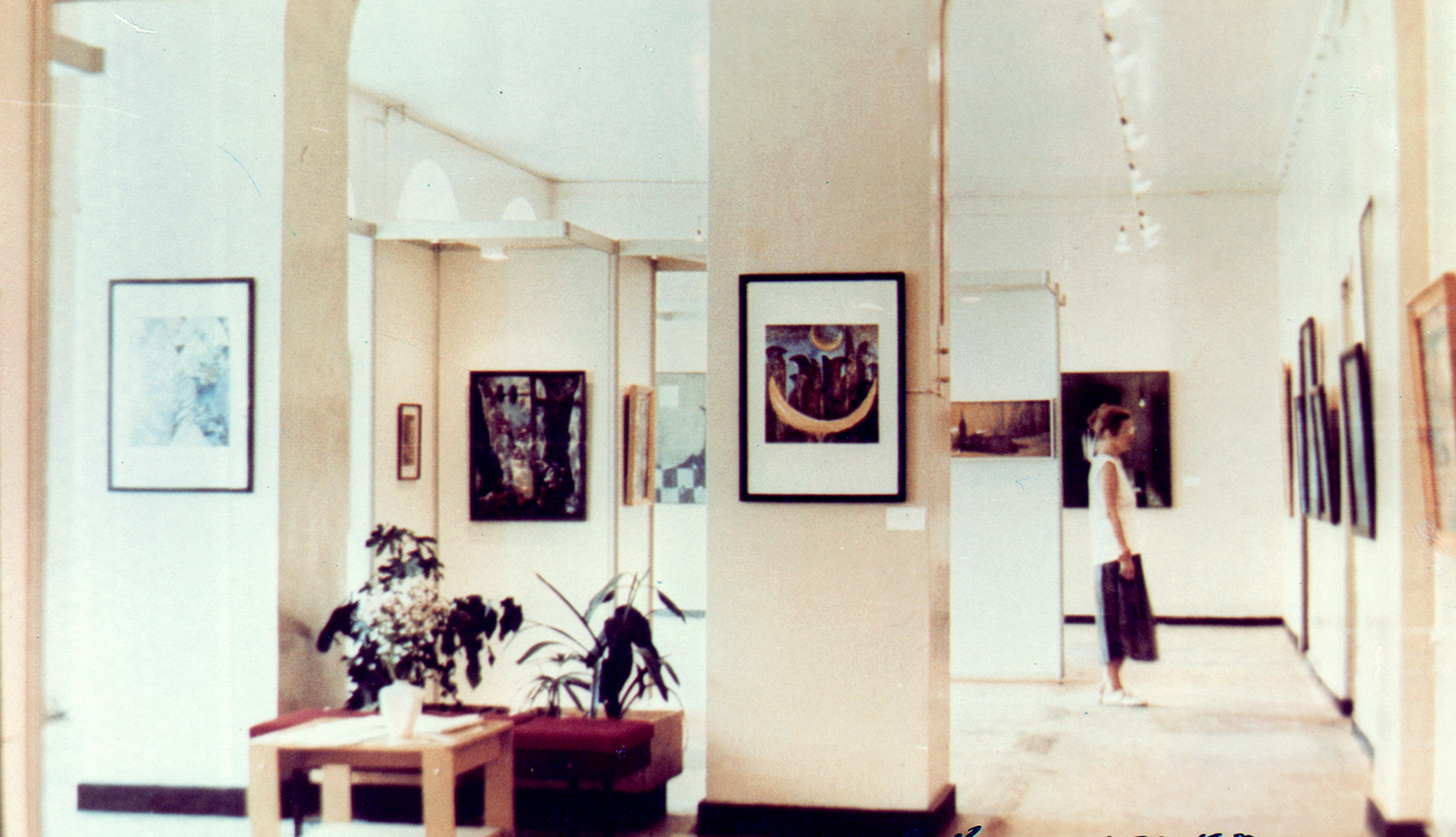 Фотография фрагмента экспозиции выставки "Равноденствие". Июнь 1991 г. Галерея Невский 20. Ленинград. Андрей Корольчук, Алексей Парыгин, Владимир Иосифов.